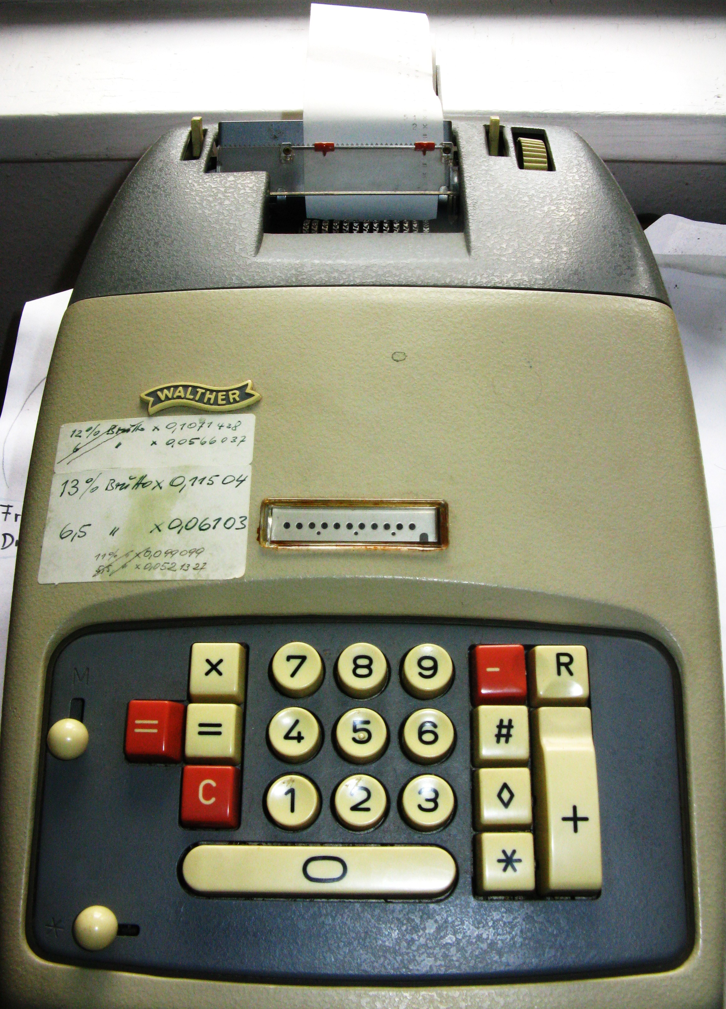 Eine "Walther Multa 32"-Rechenmaschine